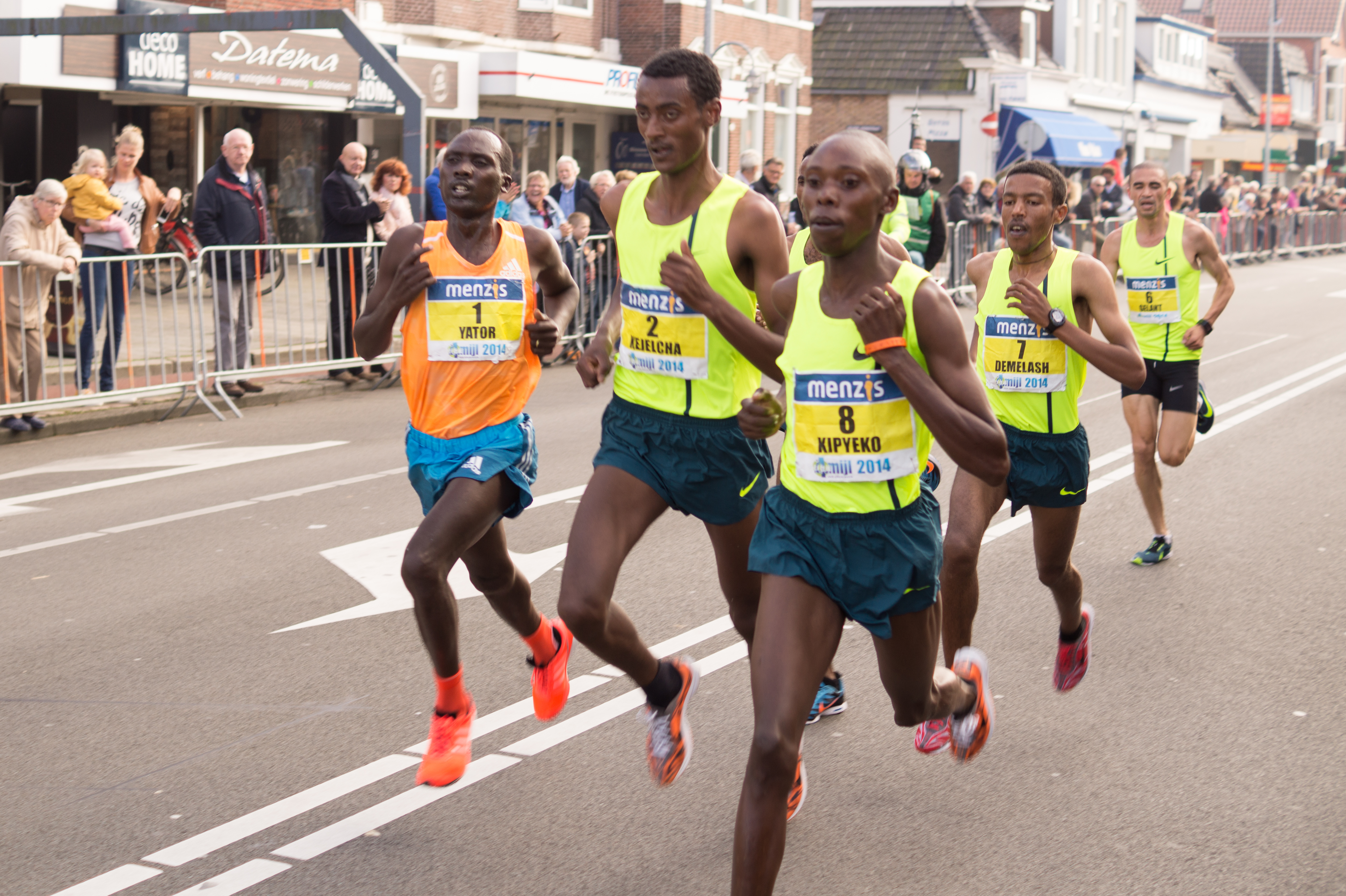 jogger-jogging-sport-marathon